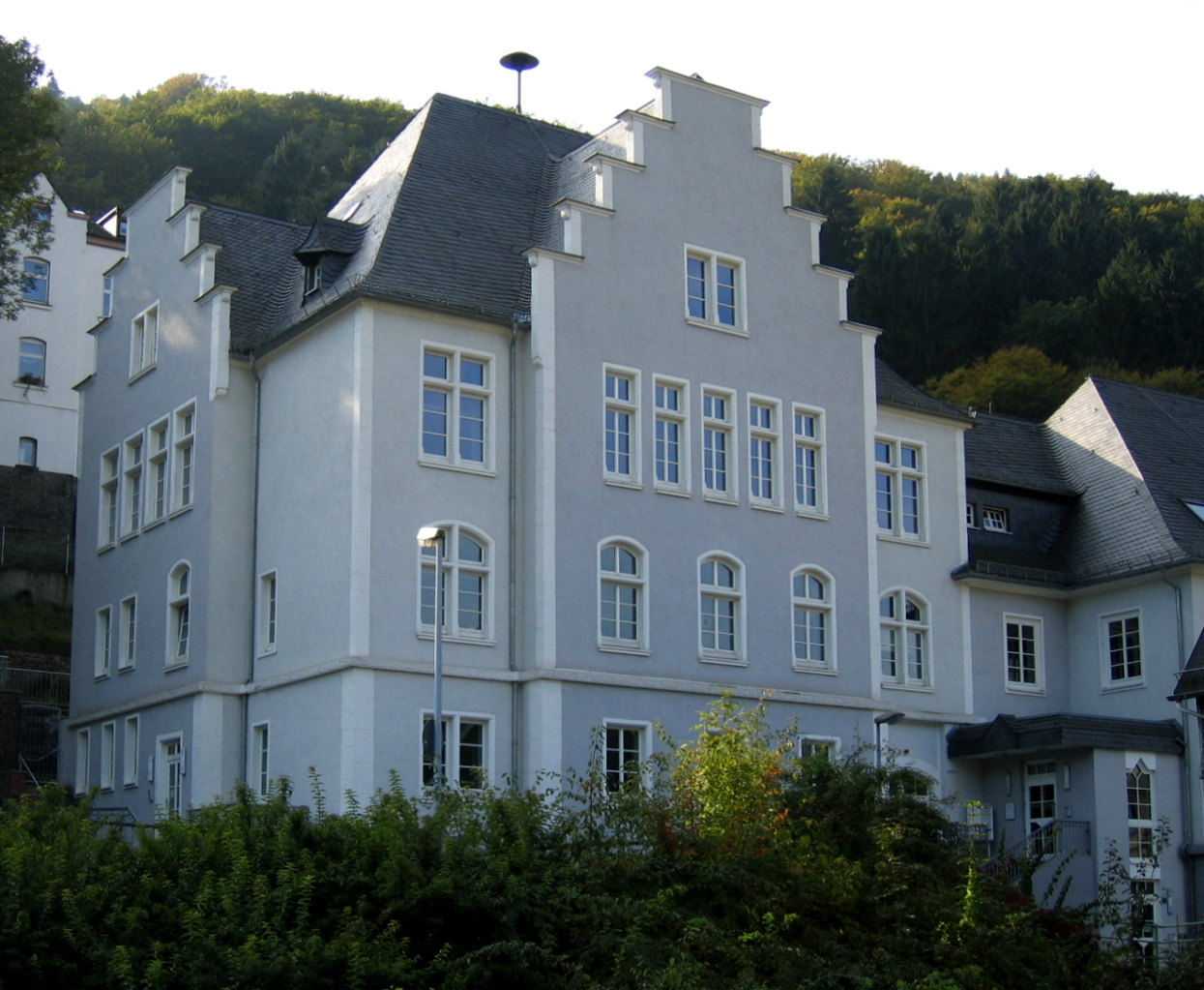 Description: Amtsgericht in Altena Source: selbst fotografiert Date: 9. Okt. 2005 Author: Bubo